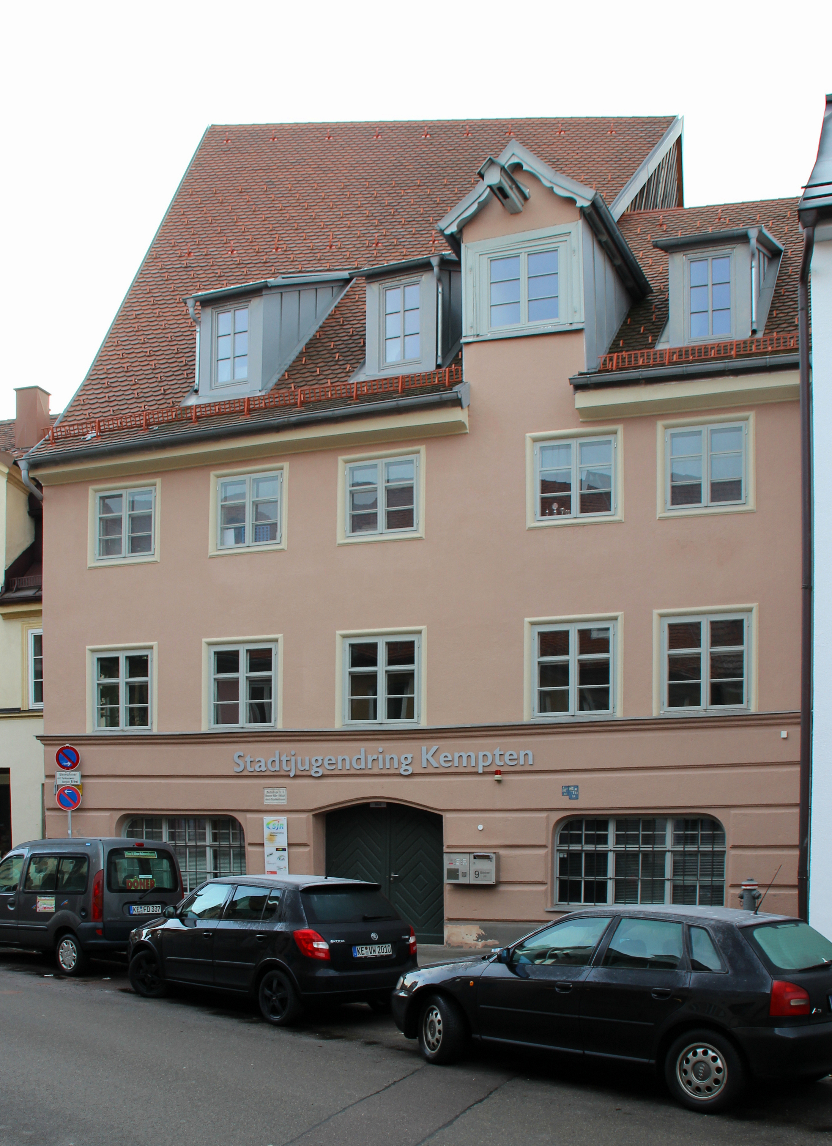 Zum Schwarzen Adler, Bäckerstr., Kempten